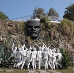 Monumento Memorial Lenin en la Colina Lenin, Cuba.